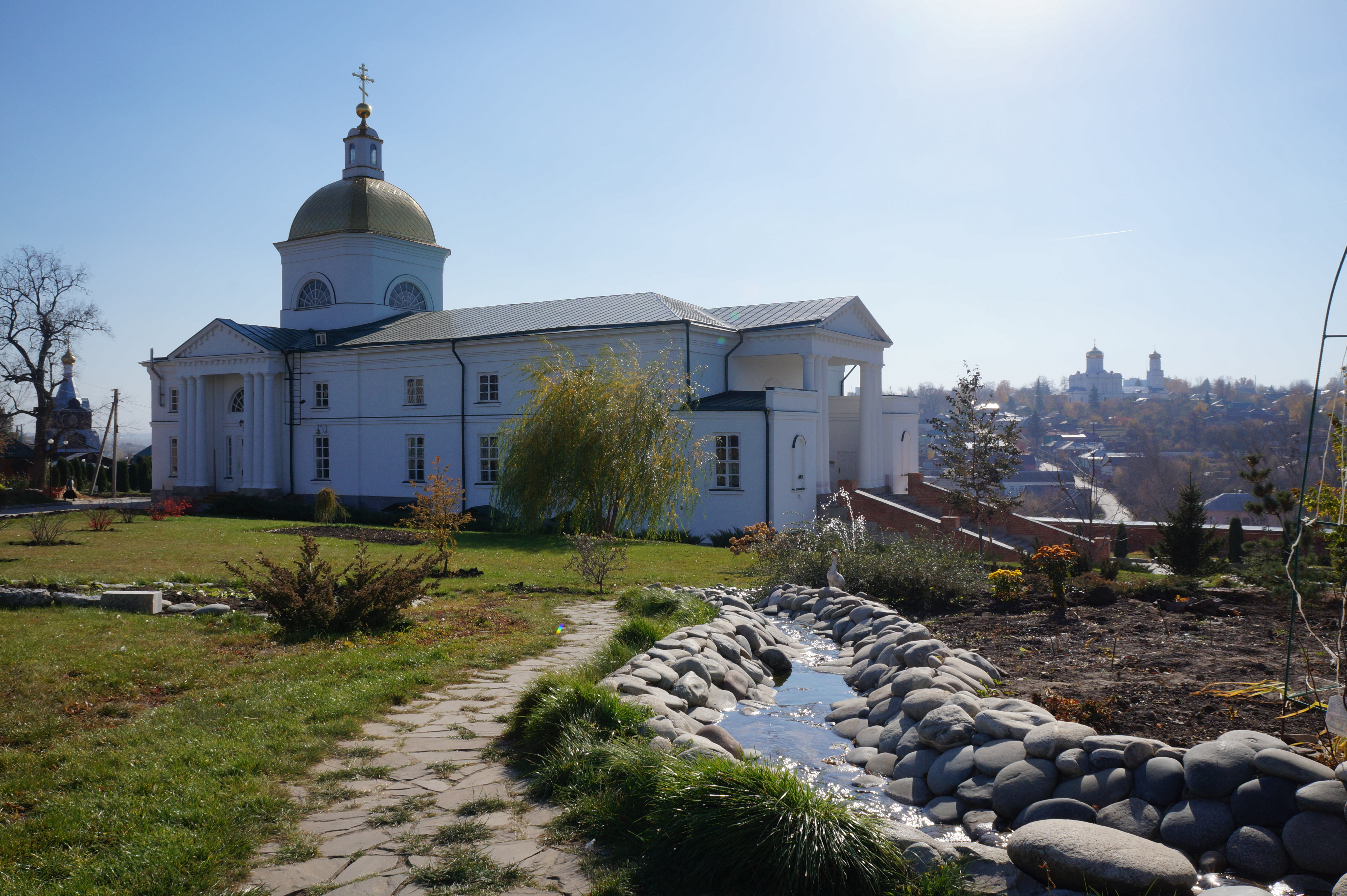 Монастырь Знаменский Елецкий (Липецкая область, Елец, рабочий городок "Каменная гора")